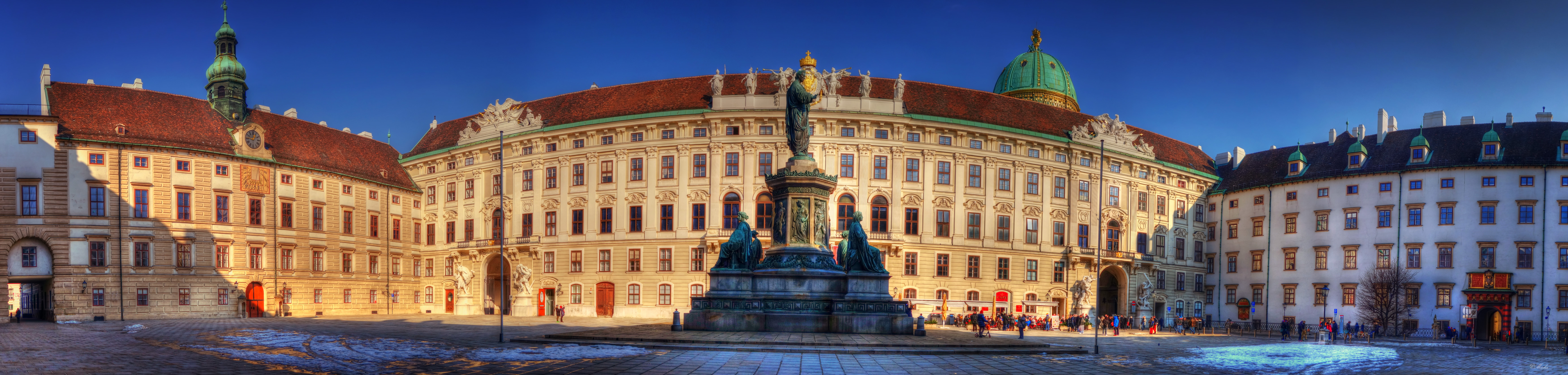 Wien Hofburg Amalienburg Reichskanzleitrakt